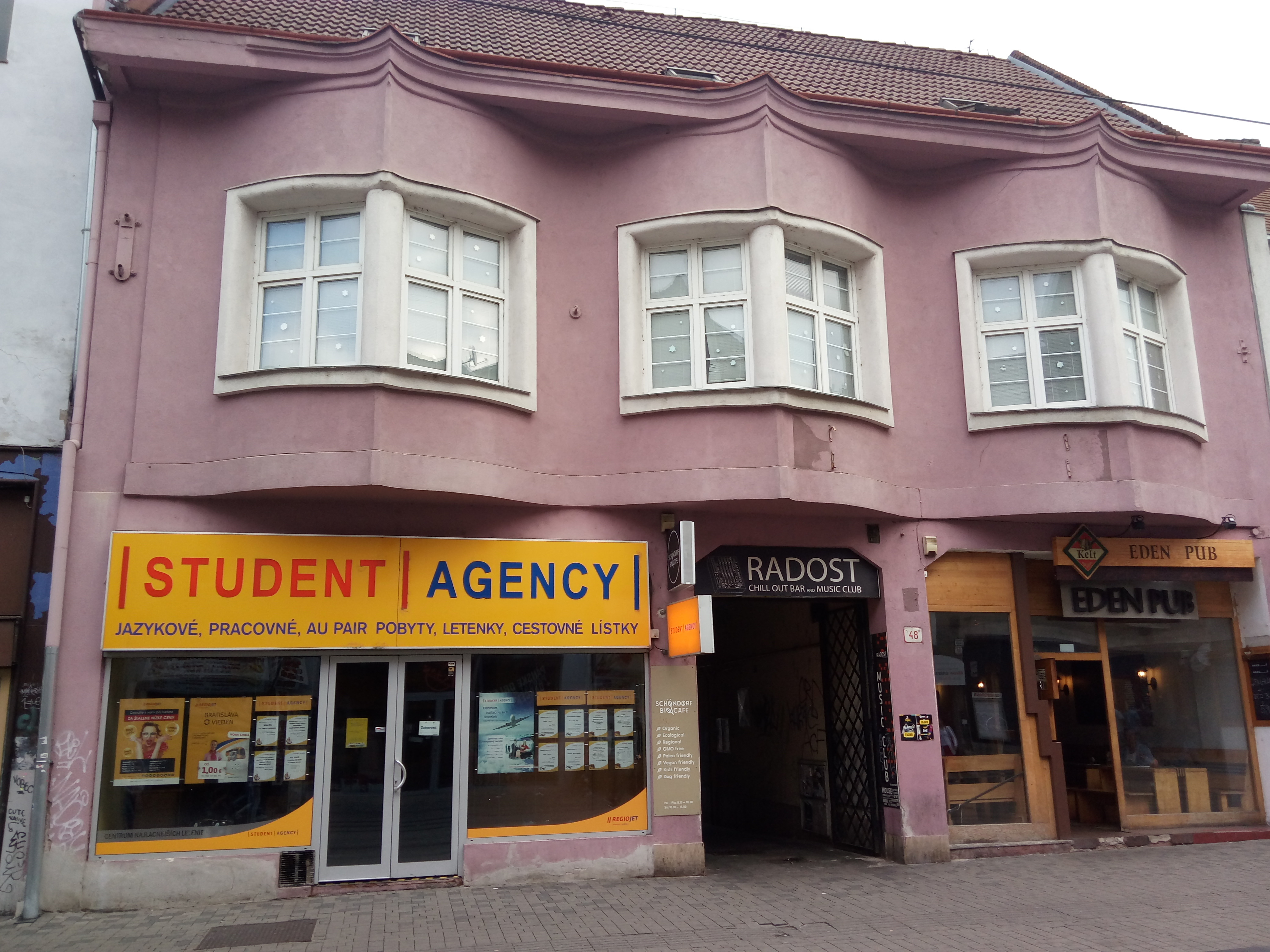 Obchodná 48, Staré Mesto, Bratislava